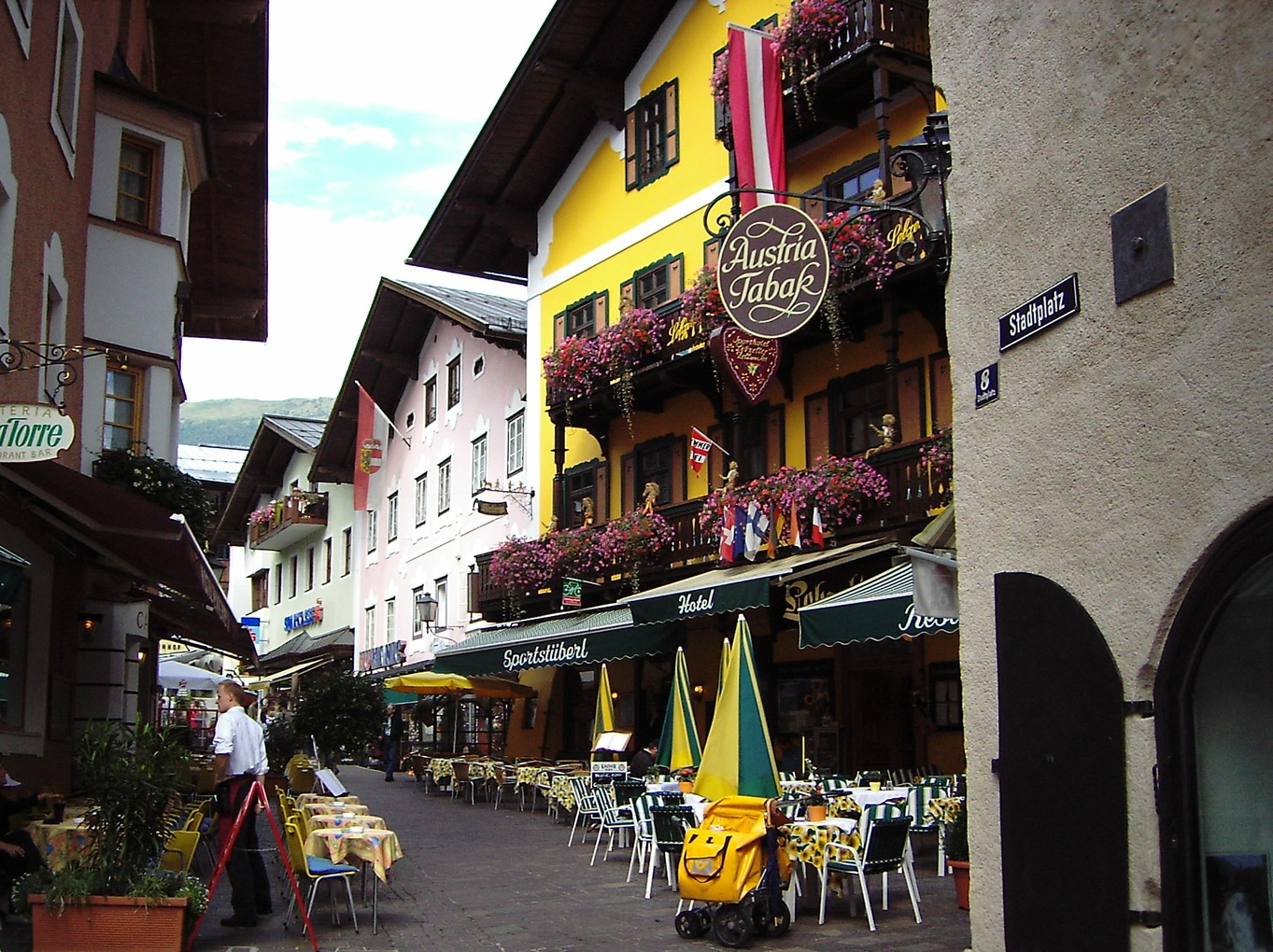 Lane "Dreifaltigkeitsgasse" to The Square "Stadtplatz" Of The Town Zell am See, Salzburger Land - Austria